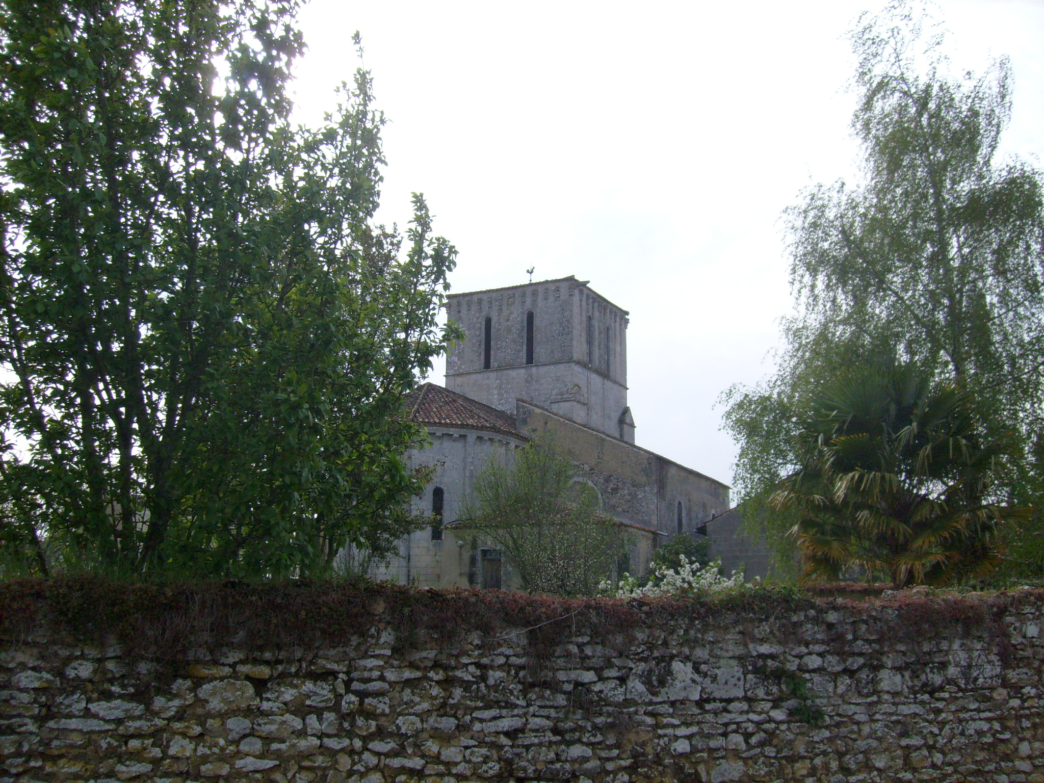 Le village de Lussant